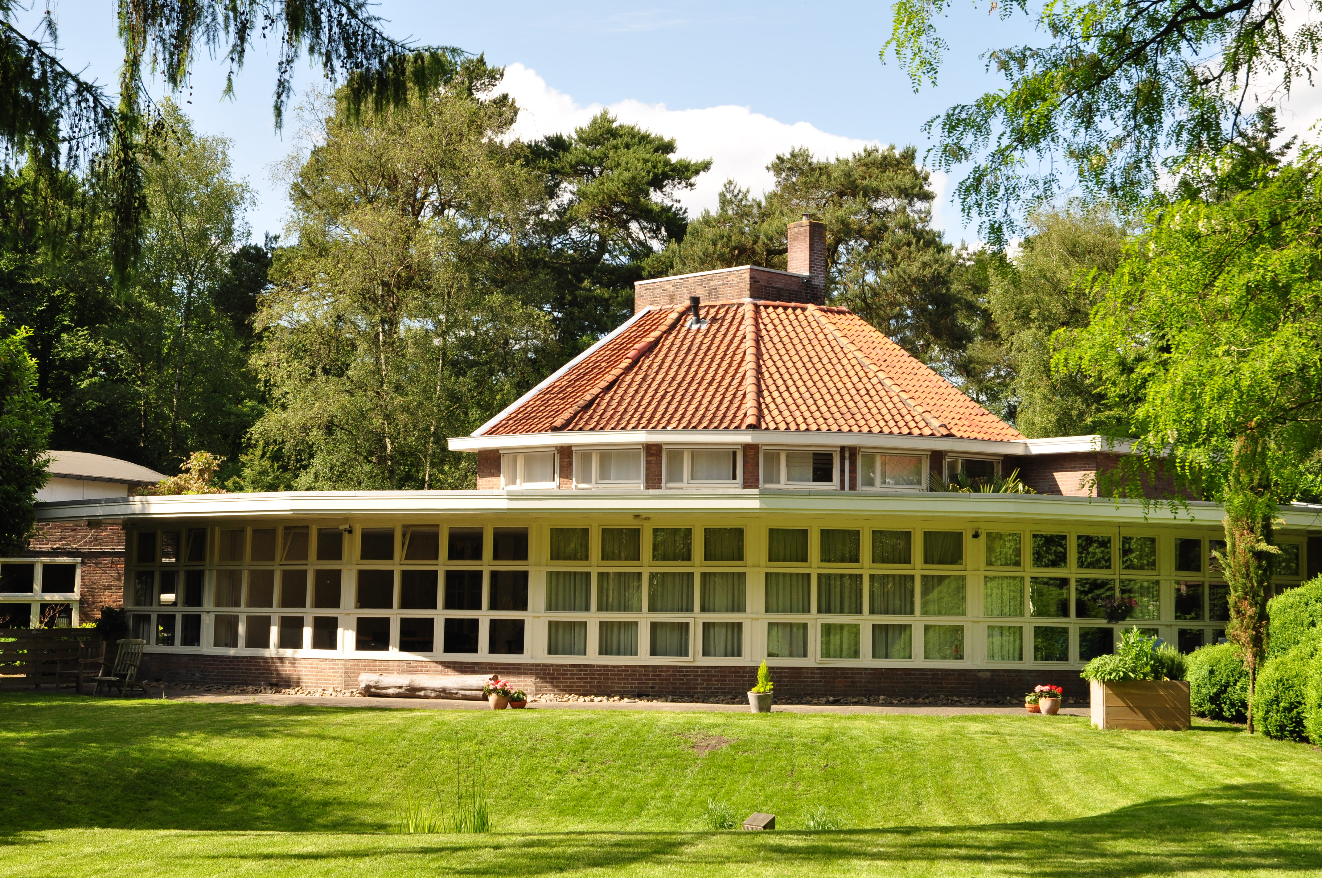 Het oorspronkelijke gebouw van de Werkplaats Kindergemeenschap uit 1927-1929.